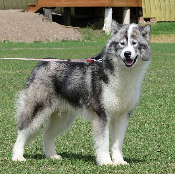 Perro de raza esquimal canadiense, también llamado "Qimmiq".